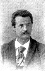 foto dello scacchista Beniamino Vergani (1863-1927)